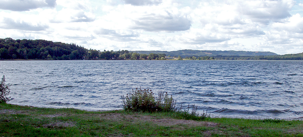 Knudsø ved Ry, Århus/Skanderborg Amt Jylland , Denmark Image by user:Nico-dk / Nils Jepsen